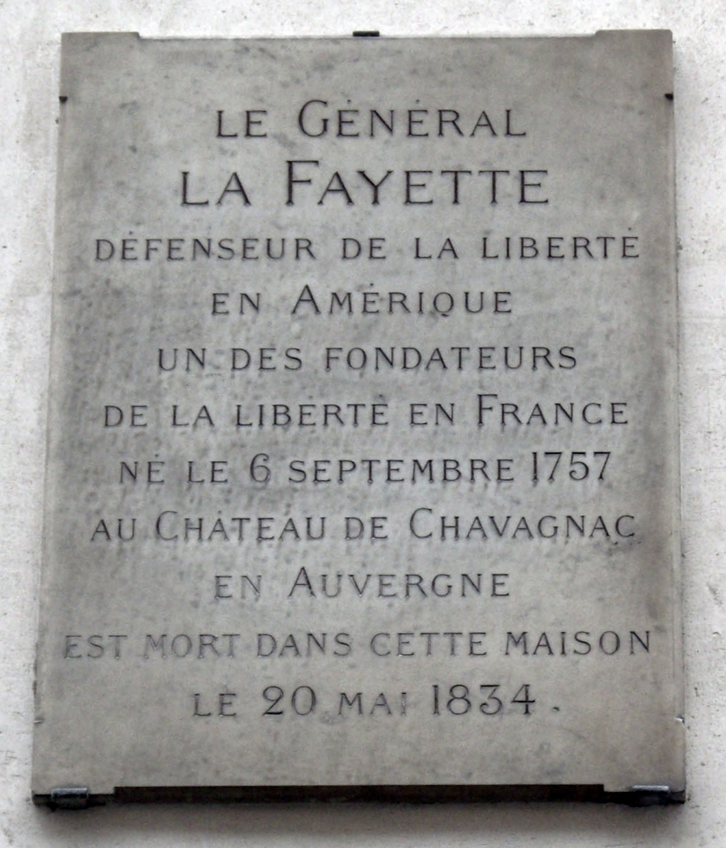 Plaque apposée au n° 8 de la rue d'Anjou, Paris 8e, où mourut le marquis de La Fayette (1757-1834) le 20 mai 1834.